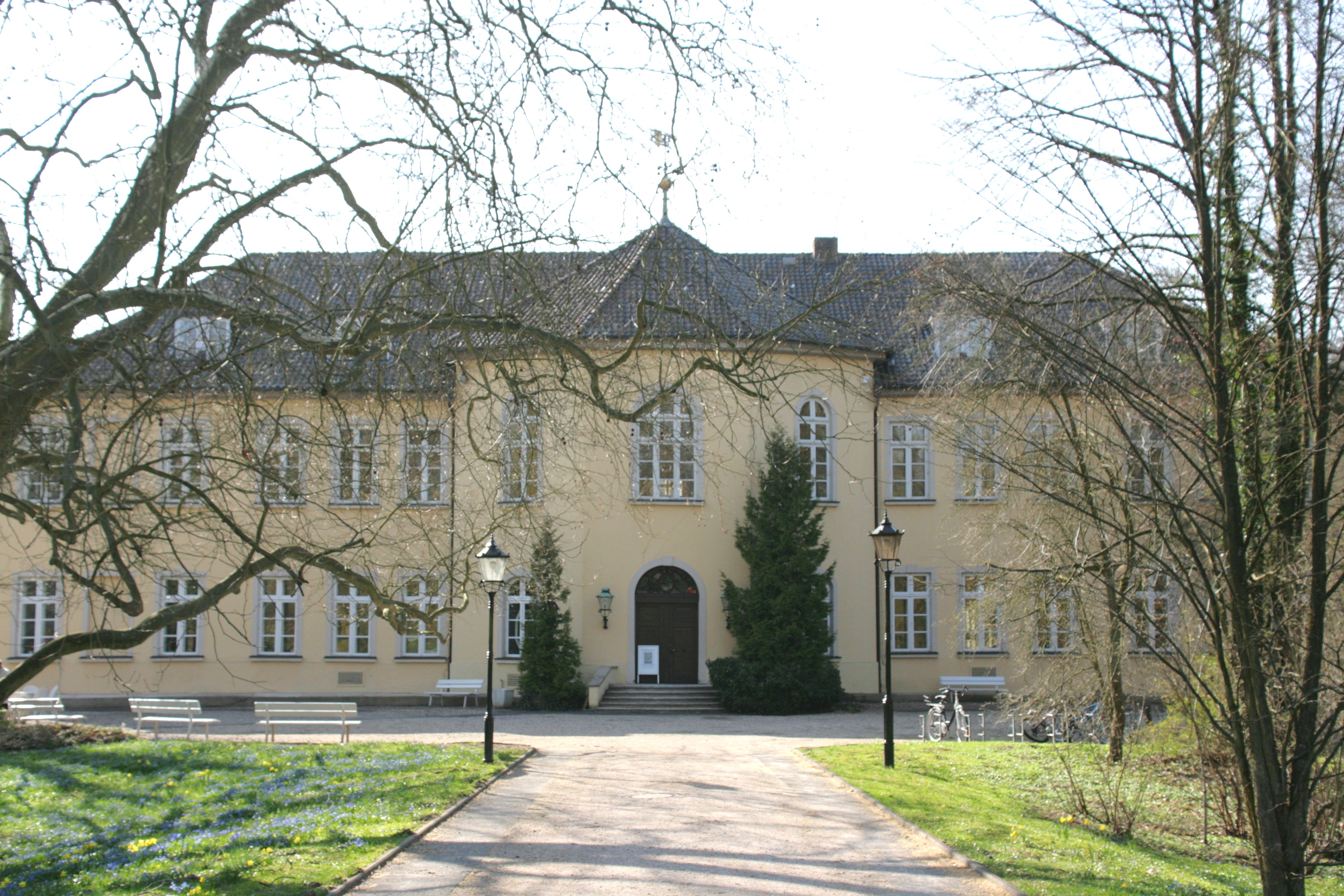 Schloss Holdenstedt, Schloßstraße 4 in Holdenstedt, Uelzen